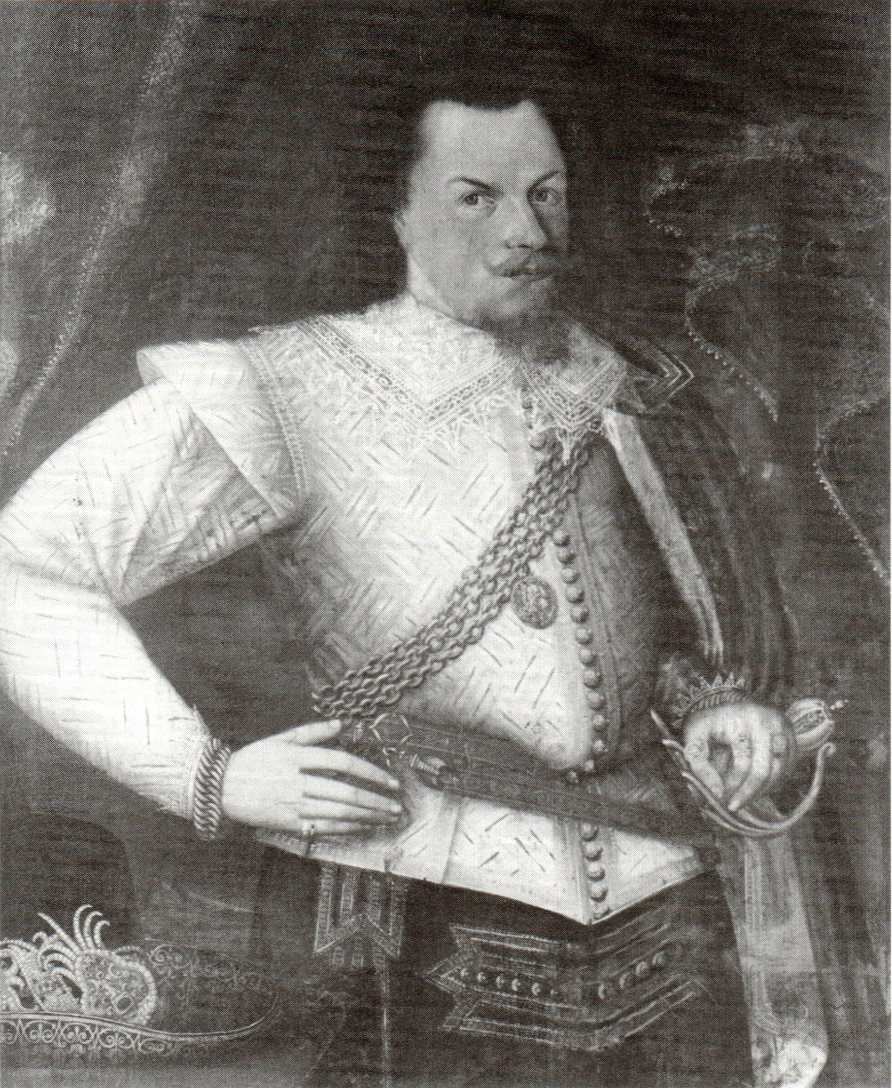 Ölgemälde von Herzog Philipp Julius von Pommern-Wolgast, früher Pommersches Landesmuseum Stettin, seit 1945 verschollen.